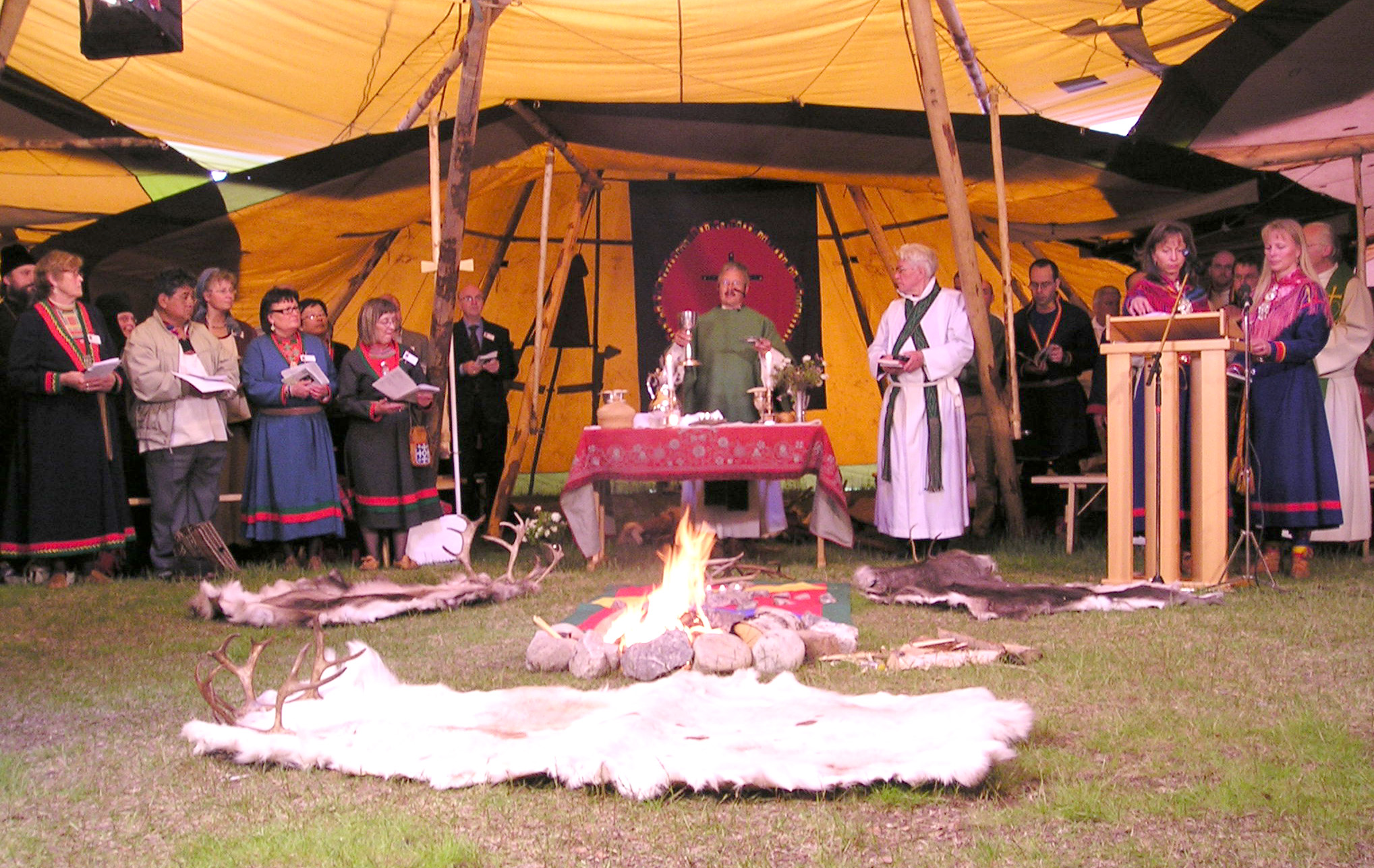 Prest for sörsamer, Bierna Bientie fra Snåsa forrettet nattverden under gudstjenesten